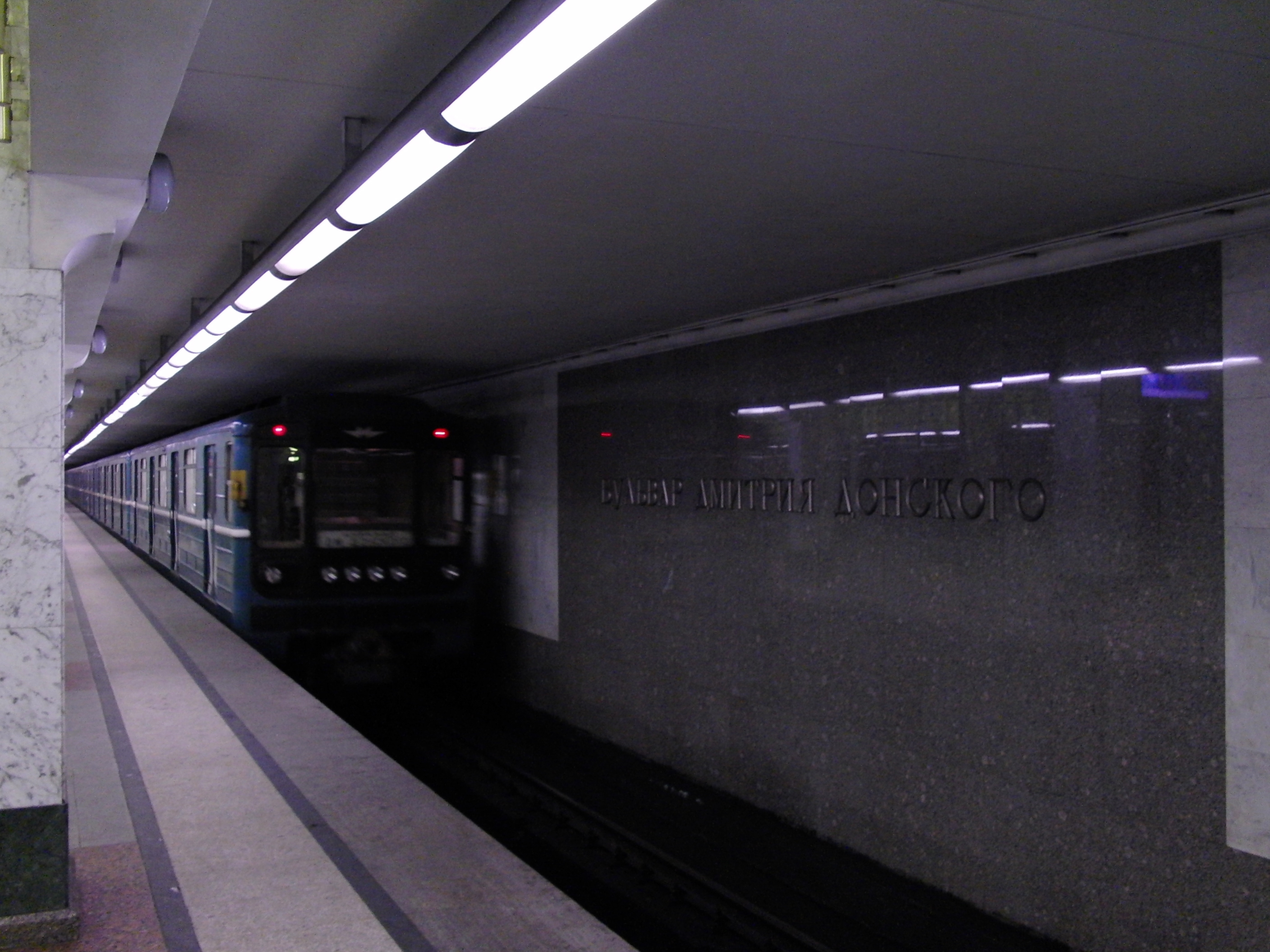 Bulvar Dmitriya Donskogo (Бульвар Дмитрия Донского)